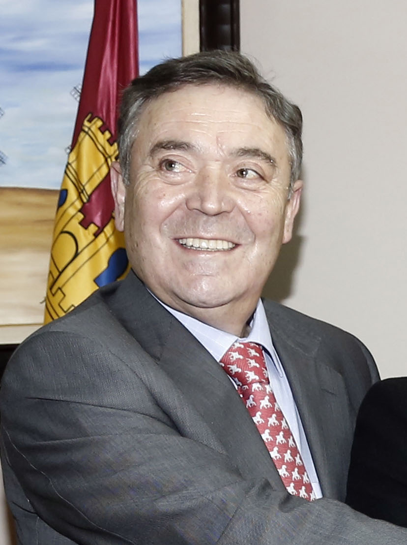 Marta García de la Calzada firma un convenio con ENRESA y el Ayuntamiento de Villar de Cañas.